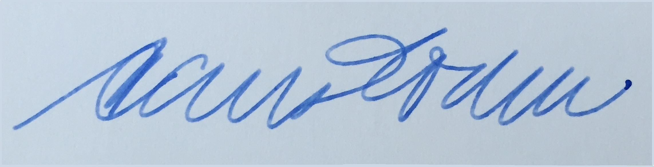 Original Autogramm Hans Eichel